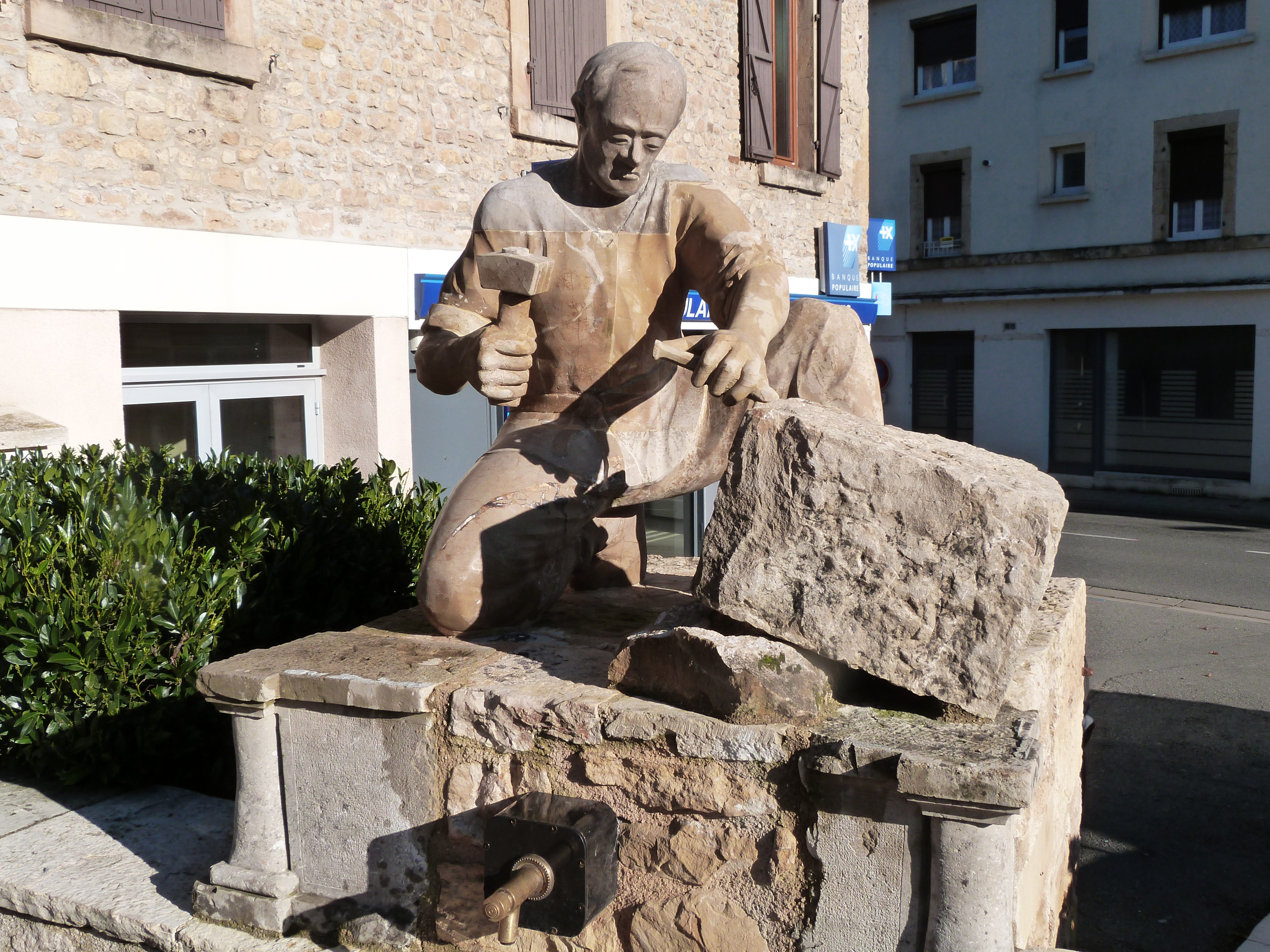 La ville de Montbazens ayant été "la cité des tailleurs de pierre" au Moyen-Age et jusqu'au XXe s., Rémier Teulier a réalisé cette sculpture en leur hommage.